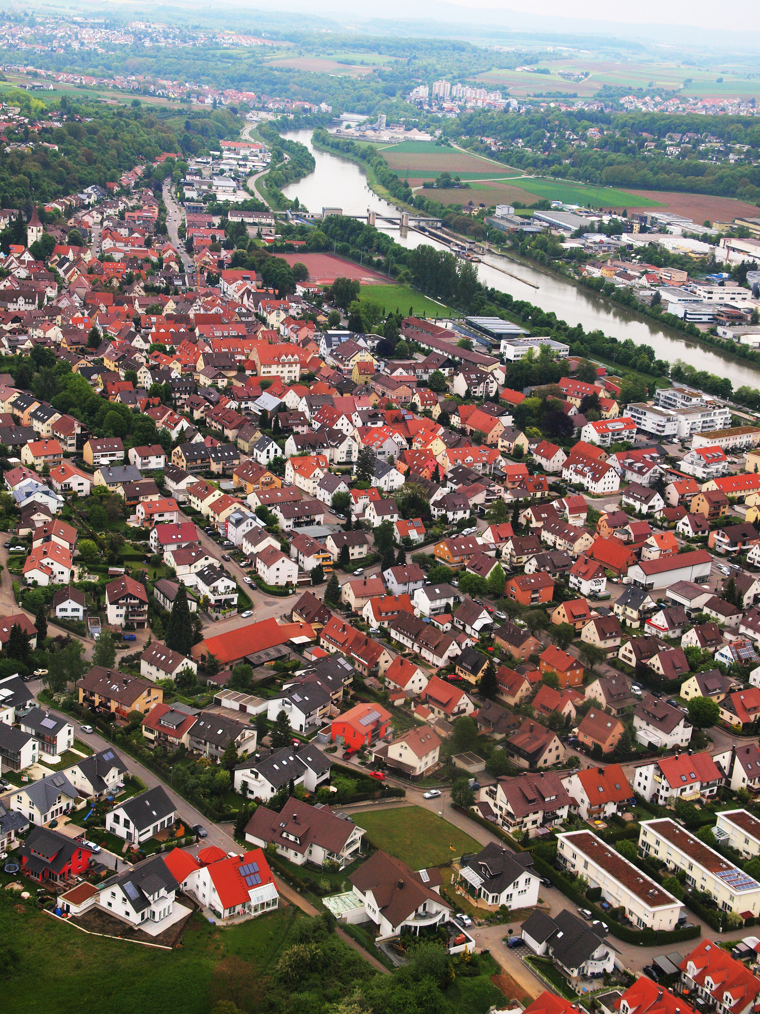 Luftaufnahme der Stadt Remseck Ortsteil Aldingen aus dem Jahr 2010